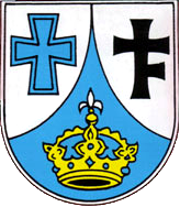 Todtenweis war neben Aindling ein Zentrum königlichen Besitzes im nördlichen Lechrain. Der Ort wird 1033 erstmals urkundlich erwähnt im Zusammenhang mit einer Schenkung der Kaiserin Kunigunde an das Augsburger Bischofskloster St. Afra, dem späteren Reichsstift St. Ulrich und Afra. Bis 1803 verblieb der Ort in dessen Besitz, erst die Säkularisation beendete die achthundertjährige Herrschaft. Ebenfalls seit dem 11. Jahrhundert verfügte das Kloster St. Ulrich und Afra über die Pfarrei Todtenweis und die St. Ulrichs-Pfarrkirche. Als Hinweis auf das Ulrichspatrozinium enthält das Gemeindewappen das Ulrichskreuz. Zur Erinnerung an die engen Beziehungen zum Kloster St. Ulrich und Afra zeigt das Gemeindewappen das mit einem Balken besteckte Kreuz, das als Konventswappen des Klosters überliefert ist. Die Königskrone weist auf die Kaiserin Kunigunde hin, die im Gemeindegebiet begütert war. Die Farben Silber und Blau erinnern an die Herrschaft der Wittelsbacher.